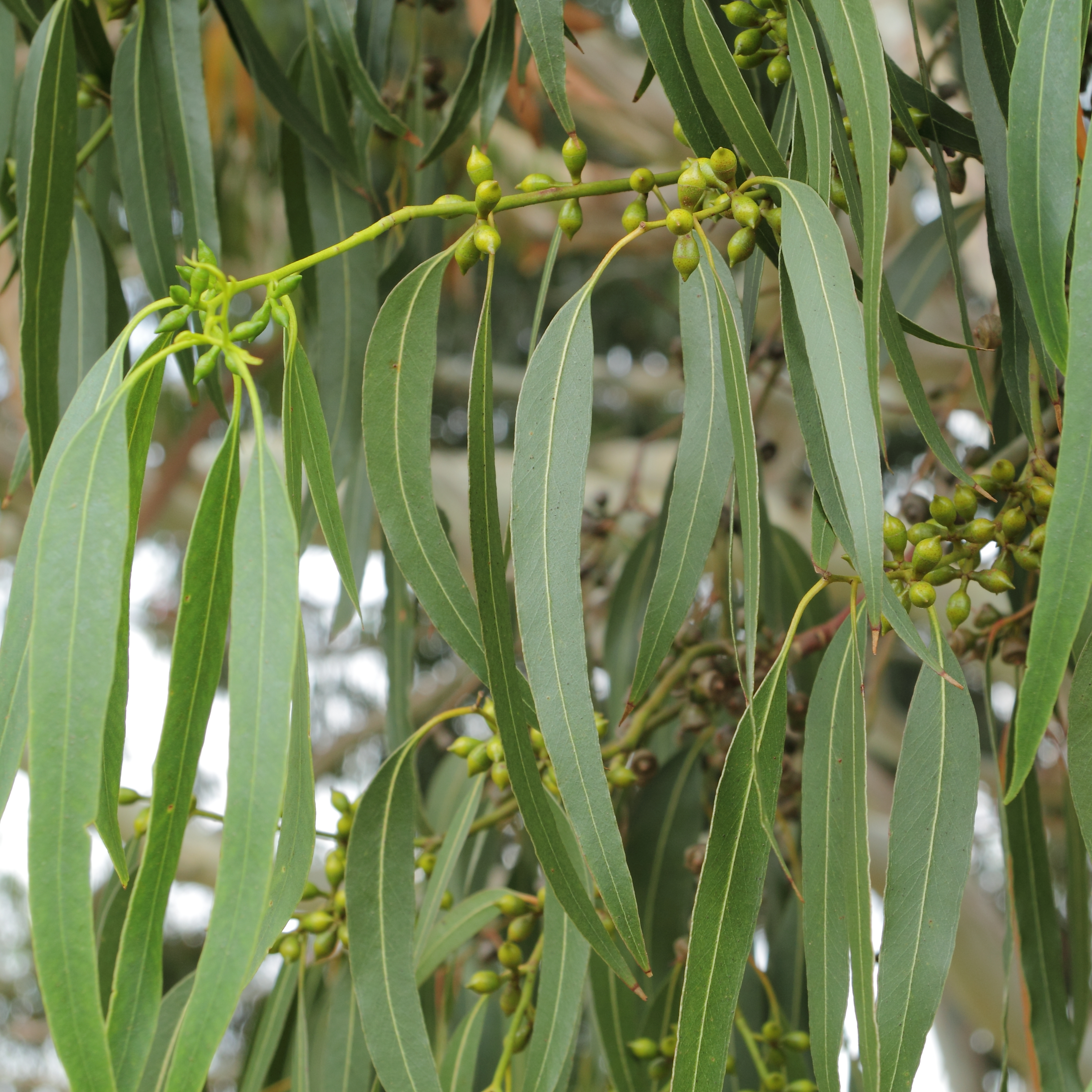 Eucalyptus dalrympleana, identifierad med hjälp av befintlig skylt vid Kew Gardens, London.